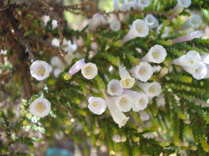 Fabiana imbricata, Jardin alpin, Jardin des Plantes de Paris